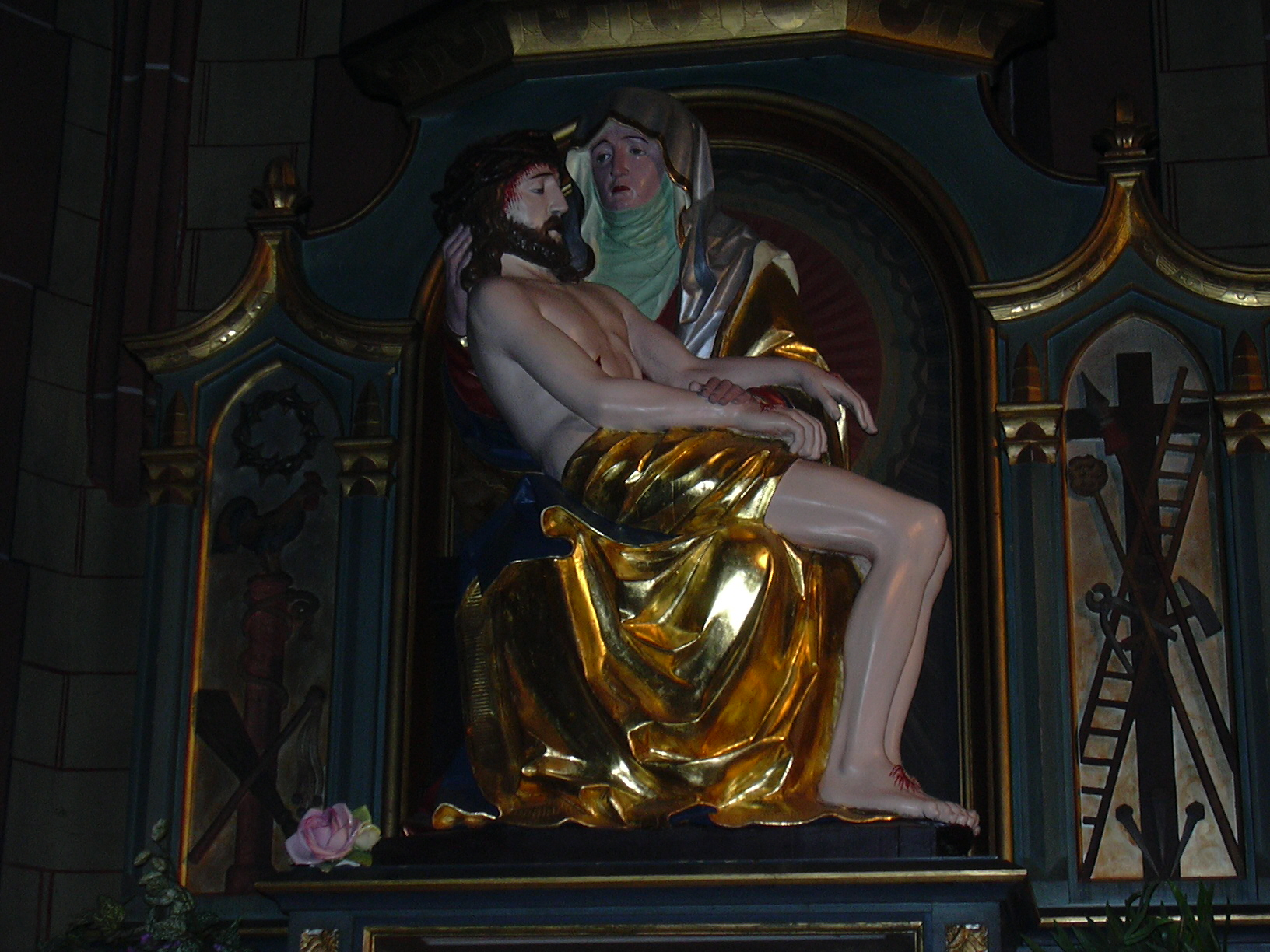 Pietà im linken Seitenschiff der Ägidiuskirche in Bad Salzig